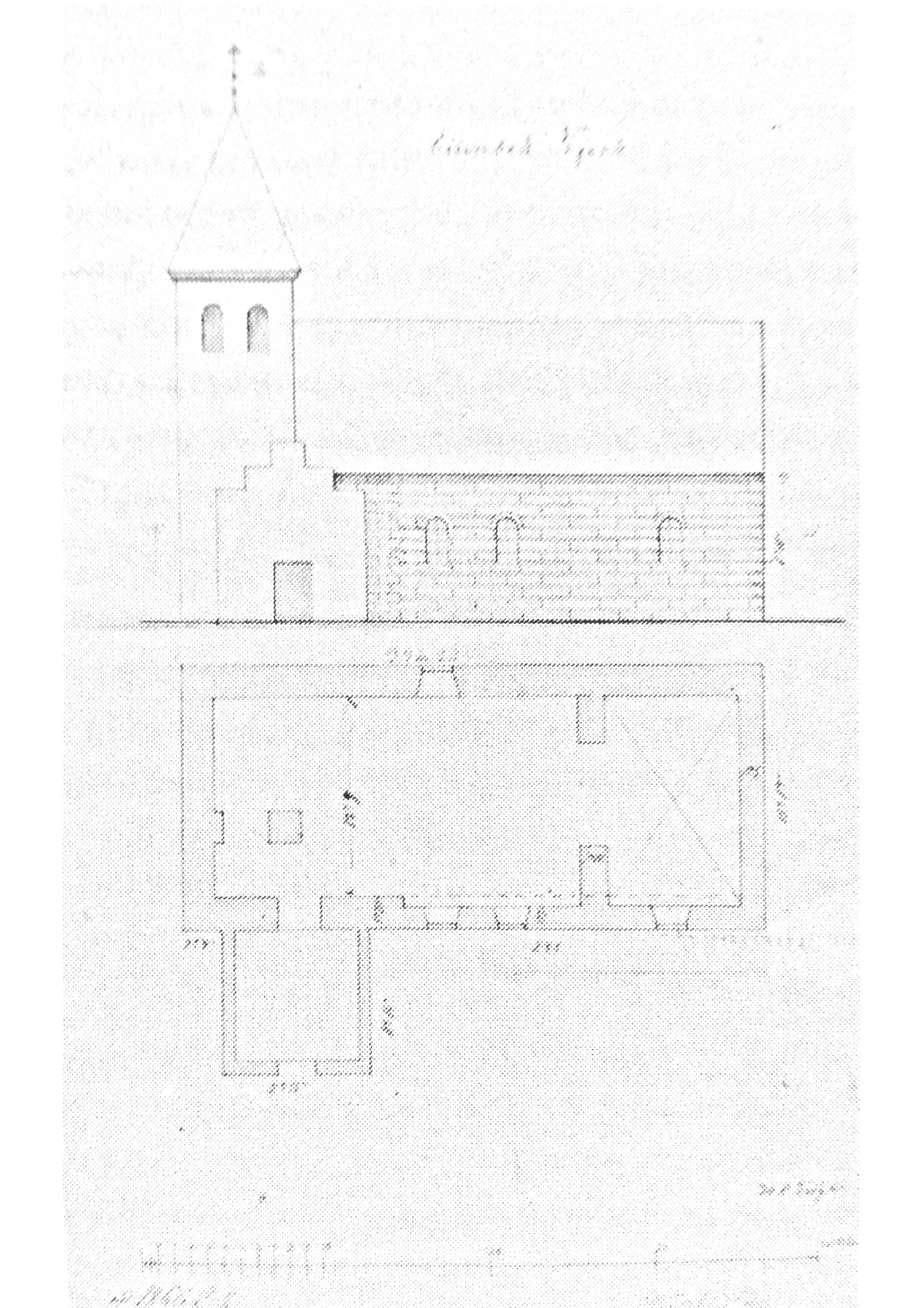 Tegning af Gammel Essenbæk Kirke fra umiddelbart før den blev nedrevet.